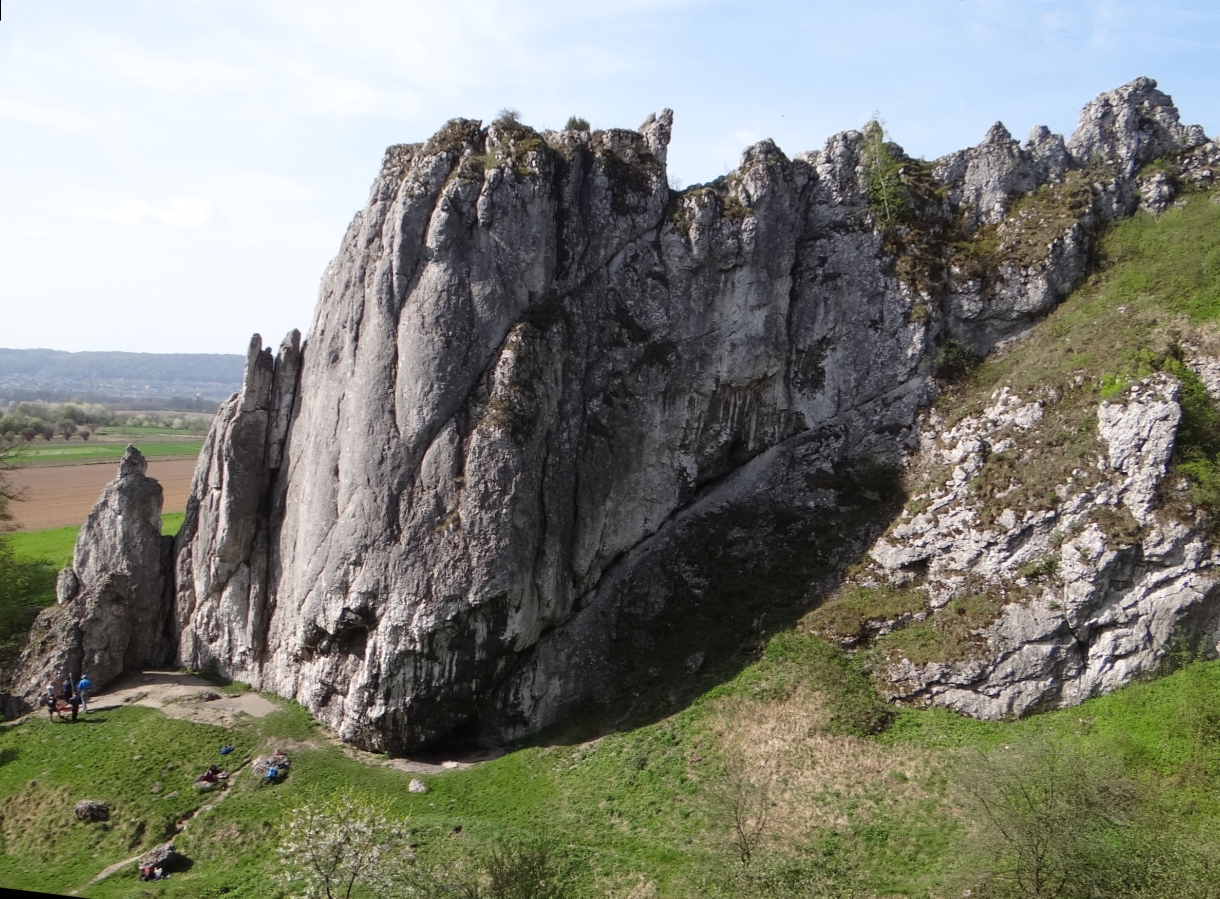 Dolina Bolechowicka: Ostra Turniczka, Turnia Łazików, Filar Pokutników i Mur Pokutników